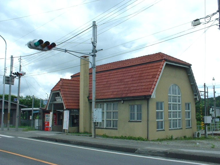 近江鉄道 鳥居本駅舎